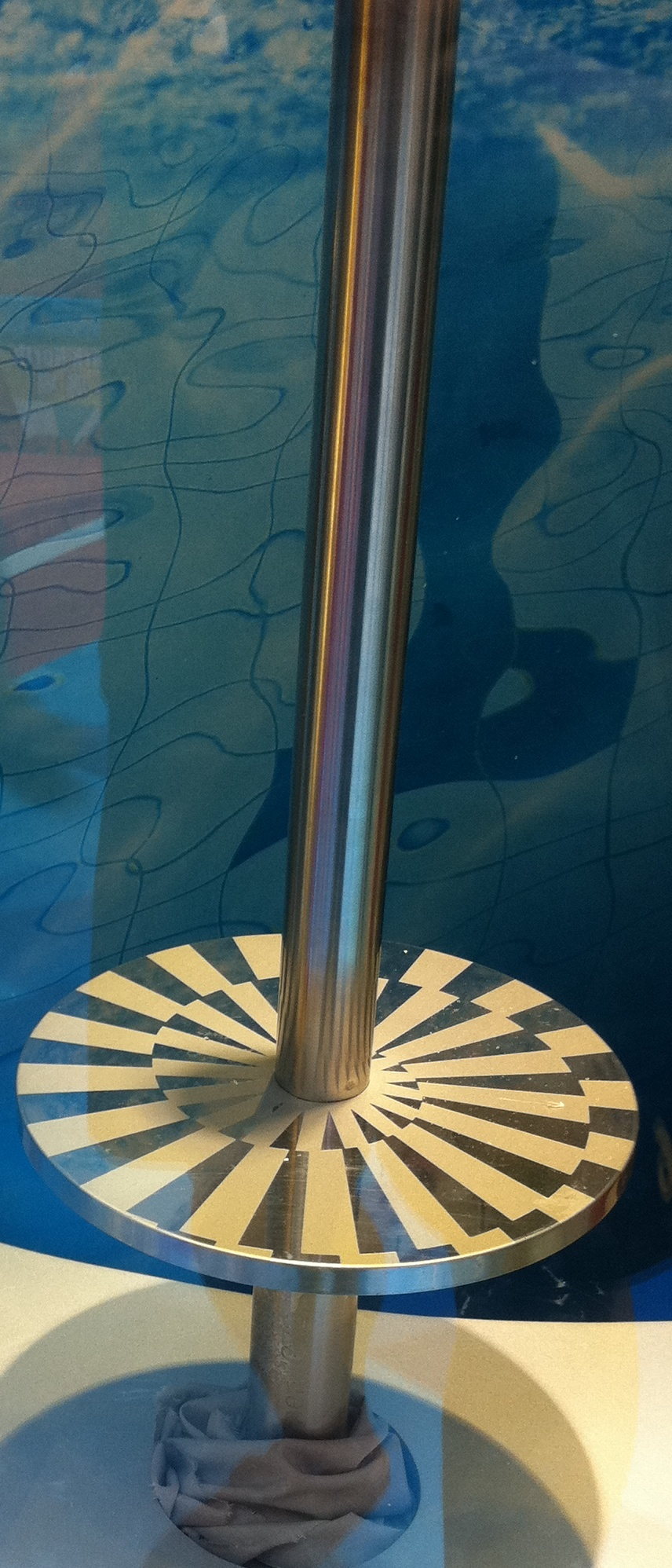 1972年夏季奧運火炬